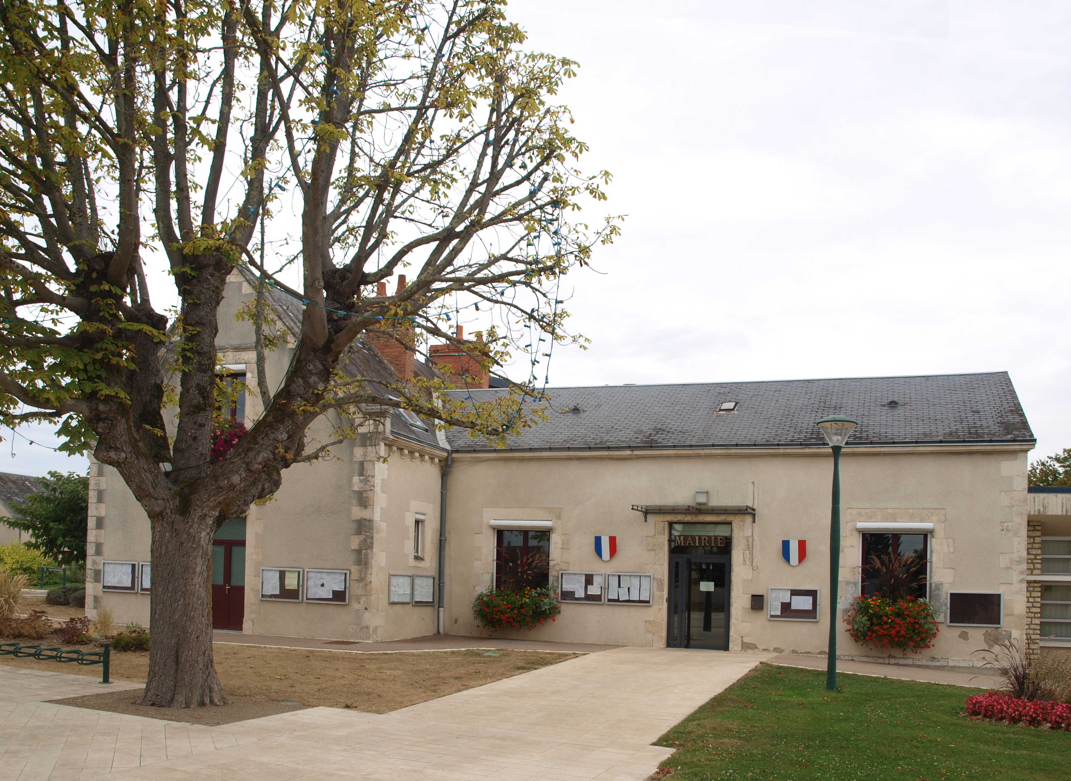 Le Poinçonnet (Indre, France)